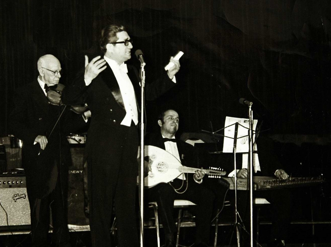 Alâeddin Yavaşça, ABD'de konserde